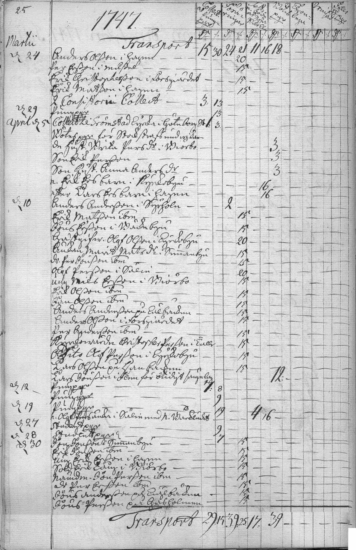 Sida ur Specialräkenskaperna (inkomst) för Floda kyrka 1747.